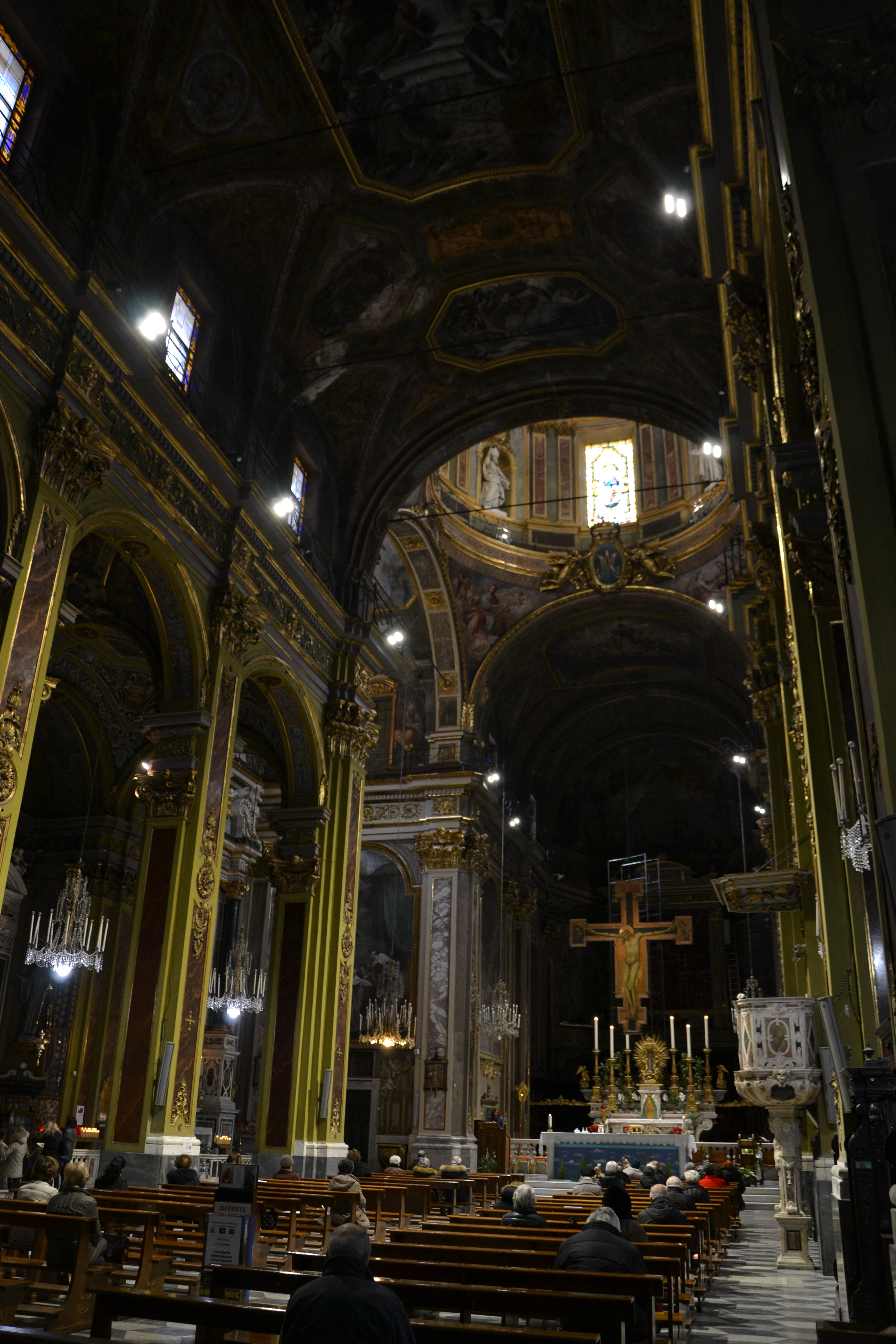 Chiesa della Consolazione (Genova)